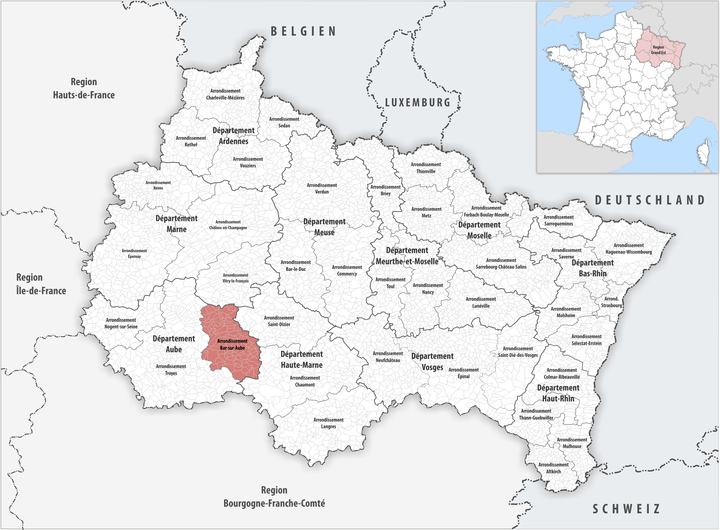 Lage des Arrondissements Bar-sur-Aube